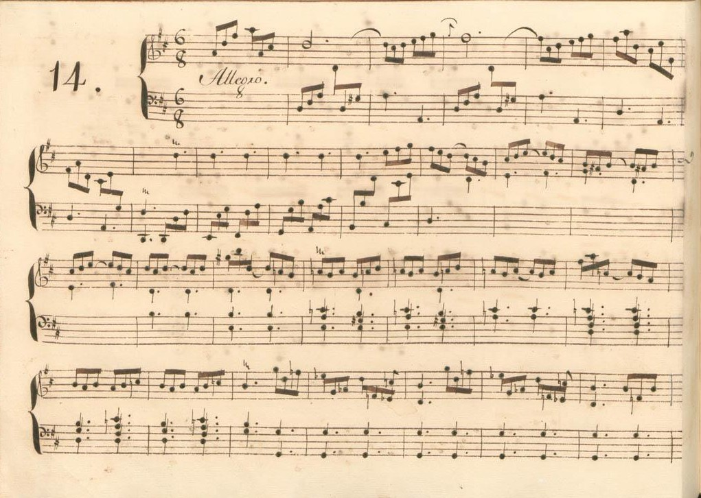 La sonate K. 401, telle qu'elle se présente dans le manuscrit de Parme, volume XI no. 14.